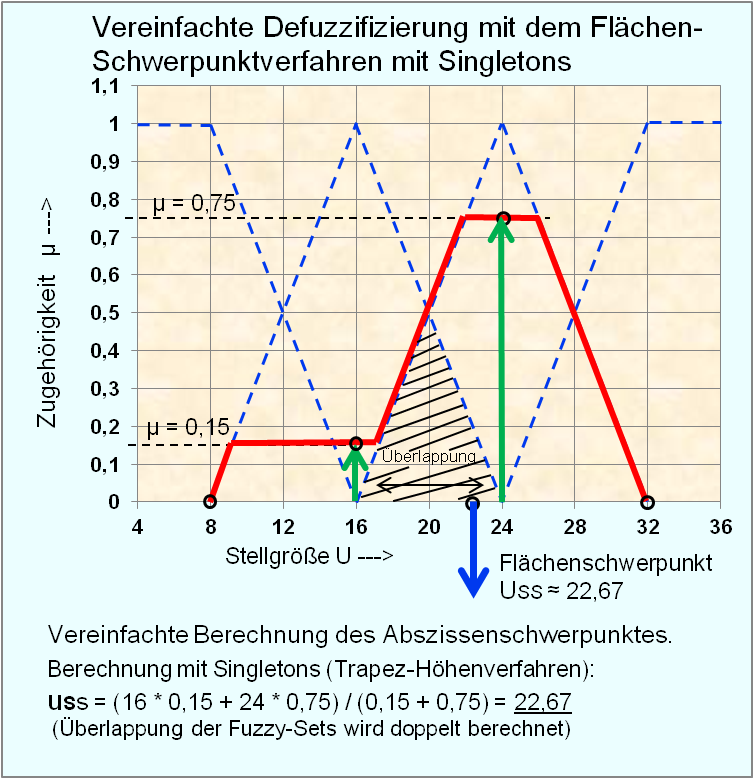 Vereinfachte Defuzzifizierung mit dem Flächen-Schwerpunktverfahren mit Singletons